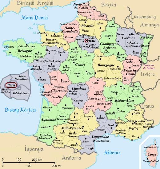 Resim şahsım tarafından Türkçe'ye çevrilmiştir.